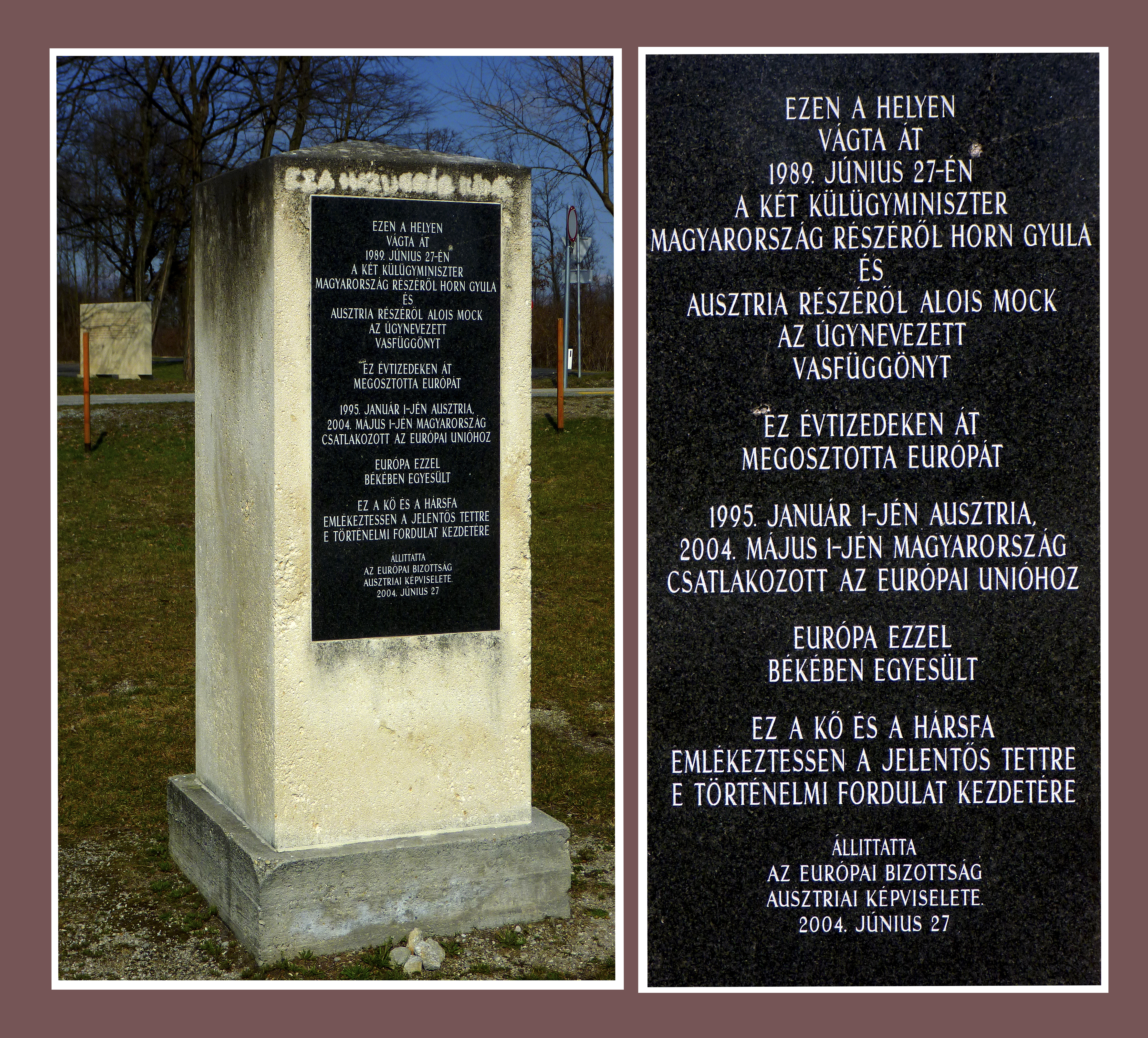 Páneurópai Piknik emlékhely: a határáttörés helyének emlékköve